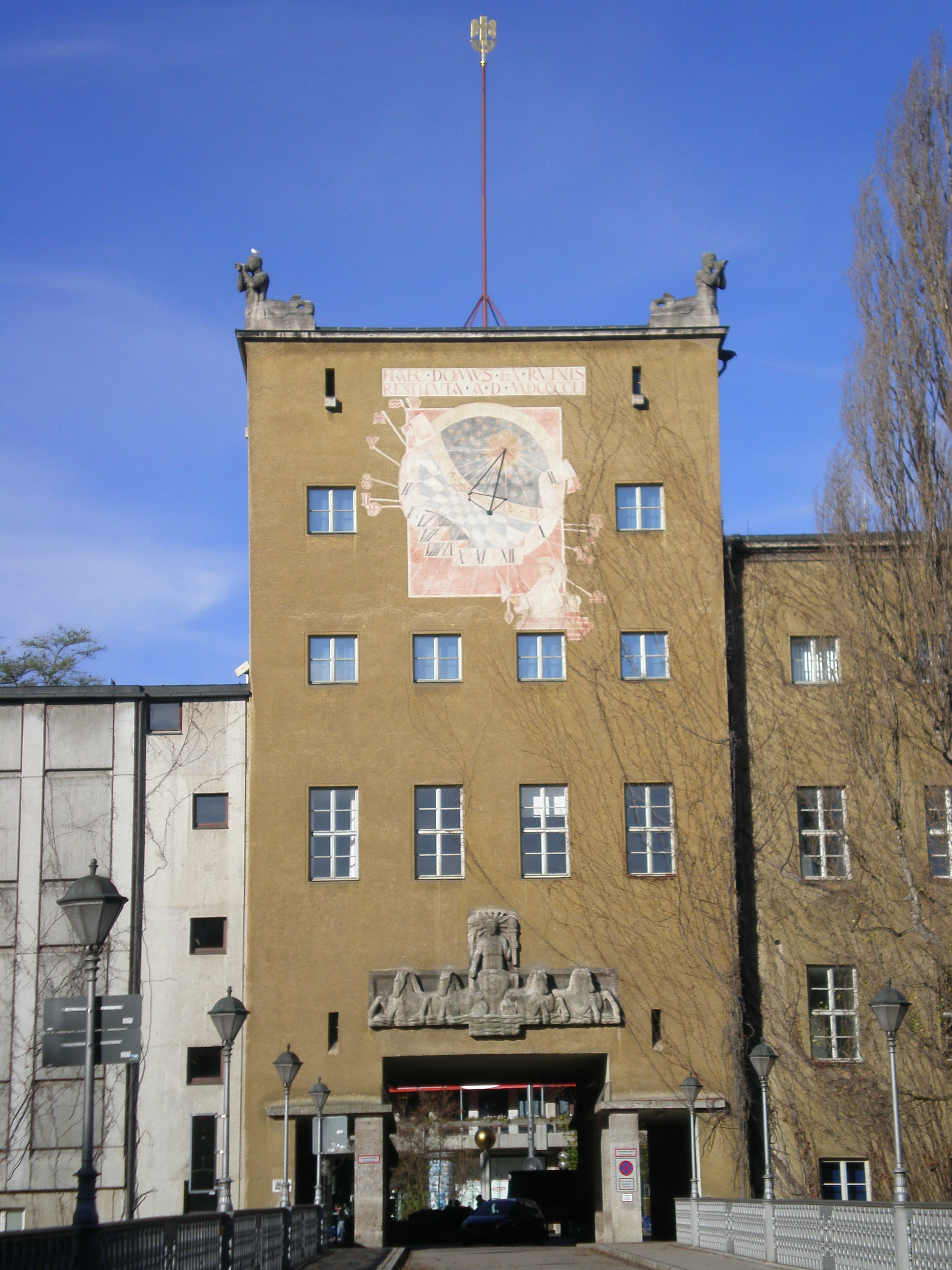 (2010.11.13) Deutsches Museum, München, Deutschland